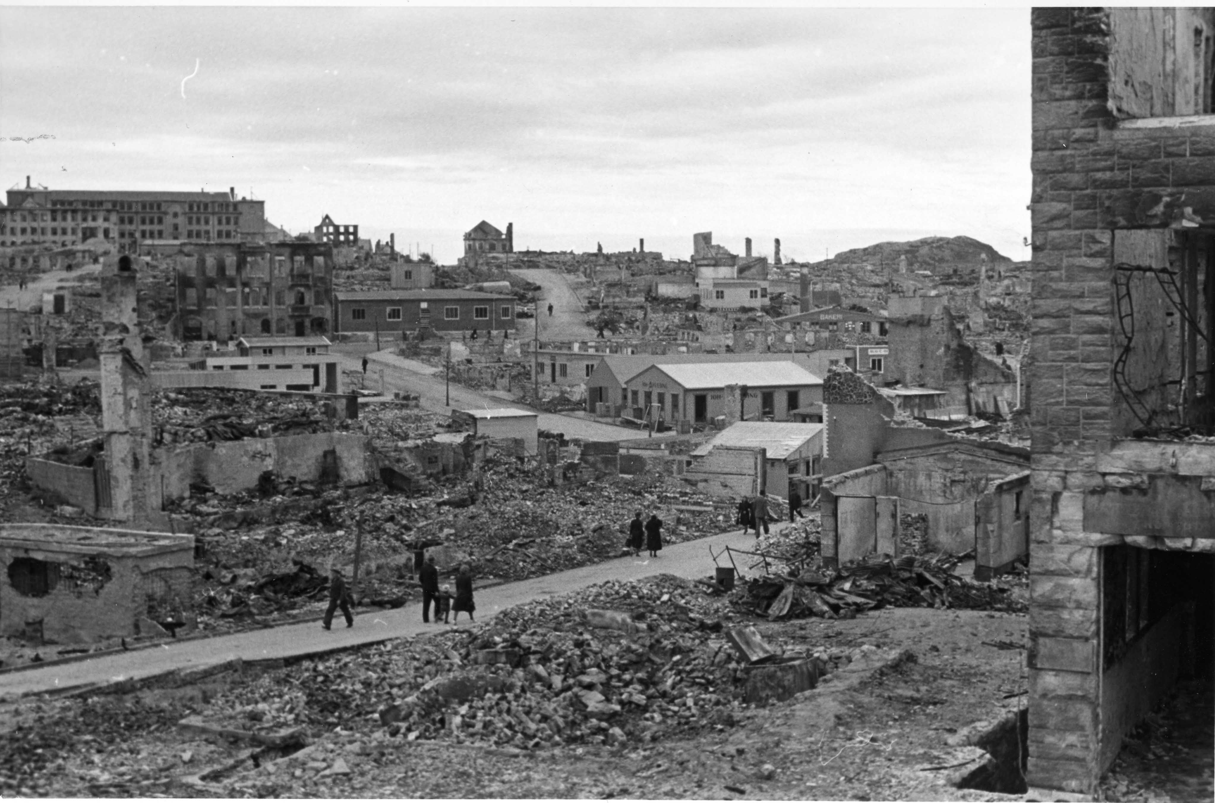 Beskrivelse: Den tyske invasjonen innebar at 24 byer og tettsteder i Norge ble bombet våren 1940. Det gjaldt bl.a. Molde, Kristiansund, Steinkjer og Namsos. Riksarkivet har mottatt 64 fotografier (papirpositiver 9 x 12 cm) som ifølge påskrift på konvolutten skal være tatt i juli 1940 i Kristiansund, Steinkjer og Levanger. Fotografiene har tilhørt ingeniør Hallvard Løken (1908-1995). Han var en dyktig amatørfotograf og kan meget vel ha tatt bildene selv. Takket være god hjelp har vi fått stedsbestemt mange av motivene, men ikke alle, og Riksarkivet mottar gjerne nærmere opplysninger. Arkivreferanse: PA-1667U2_050 The bombing of Kristiansund The German invasion resulted in 24 towns and villages being bombed in the spring of 1940. This included Molde, Kristiansund, Steinkjer and Namsos. The National Archives of Norway has received 64 photographs (paper positives 9 x 12 cm) that according to information on the envelope are taken in July 1940 in Kristiansund, Steinkjer and Levanger. The photos have belonged to engineer Hallvard Løken (1908-1995). He was a good amateur photographer and might very well have taken the photos himself. Thanks to help from others, we have been able to pinpoint many of the locations, but not all of them, and the National Archives of Norway is very happy to receive further information.